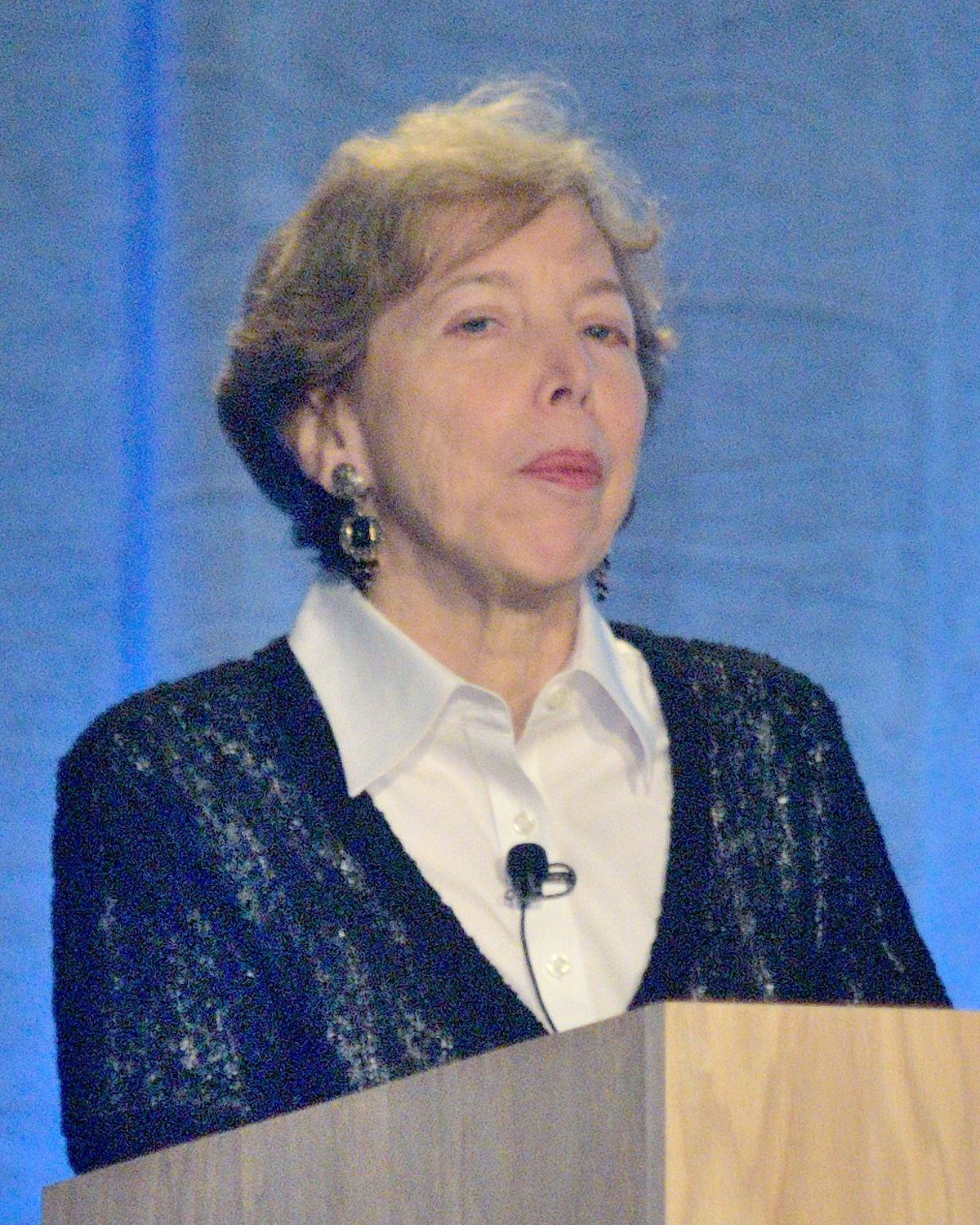 Susan Graham, panel chair. Turing 100 Programming Languages Panel